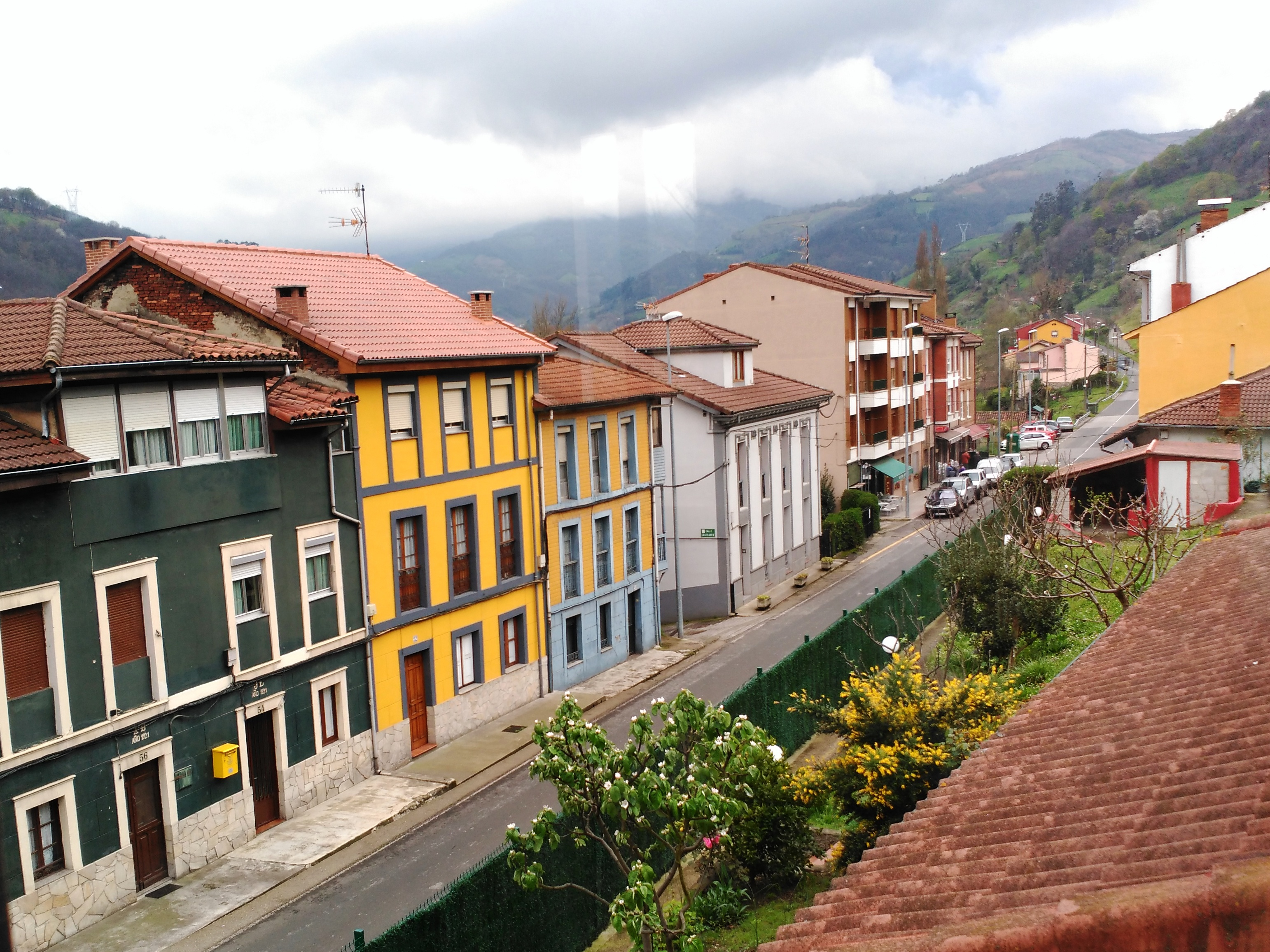 Calle principal de Villayan